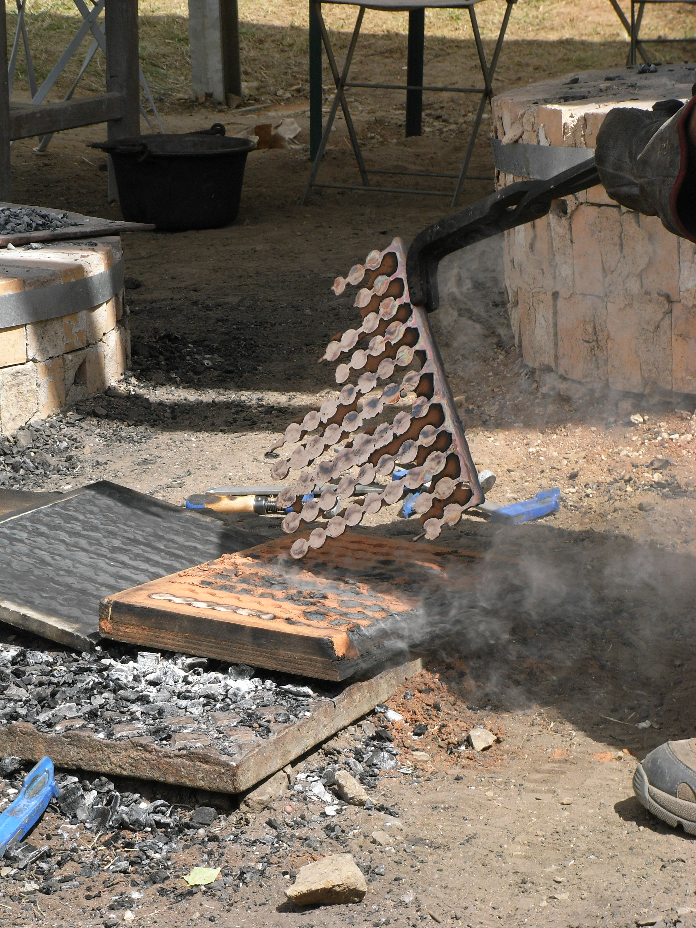 Étude scientifique historique portant sur le façonnage, opération de démoulage, de monnaie bronze (époque romaine) aux mines d'argent à Melle dans les Deux-Sèvres (France).